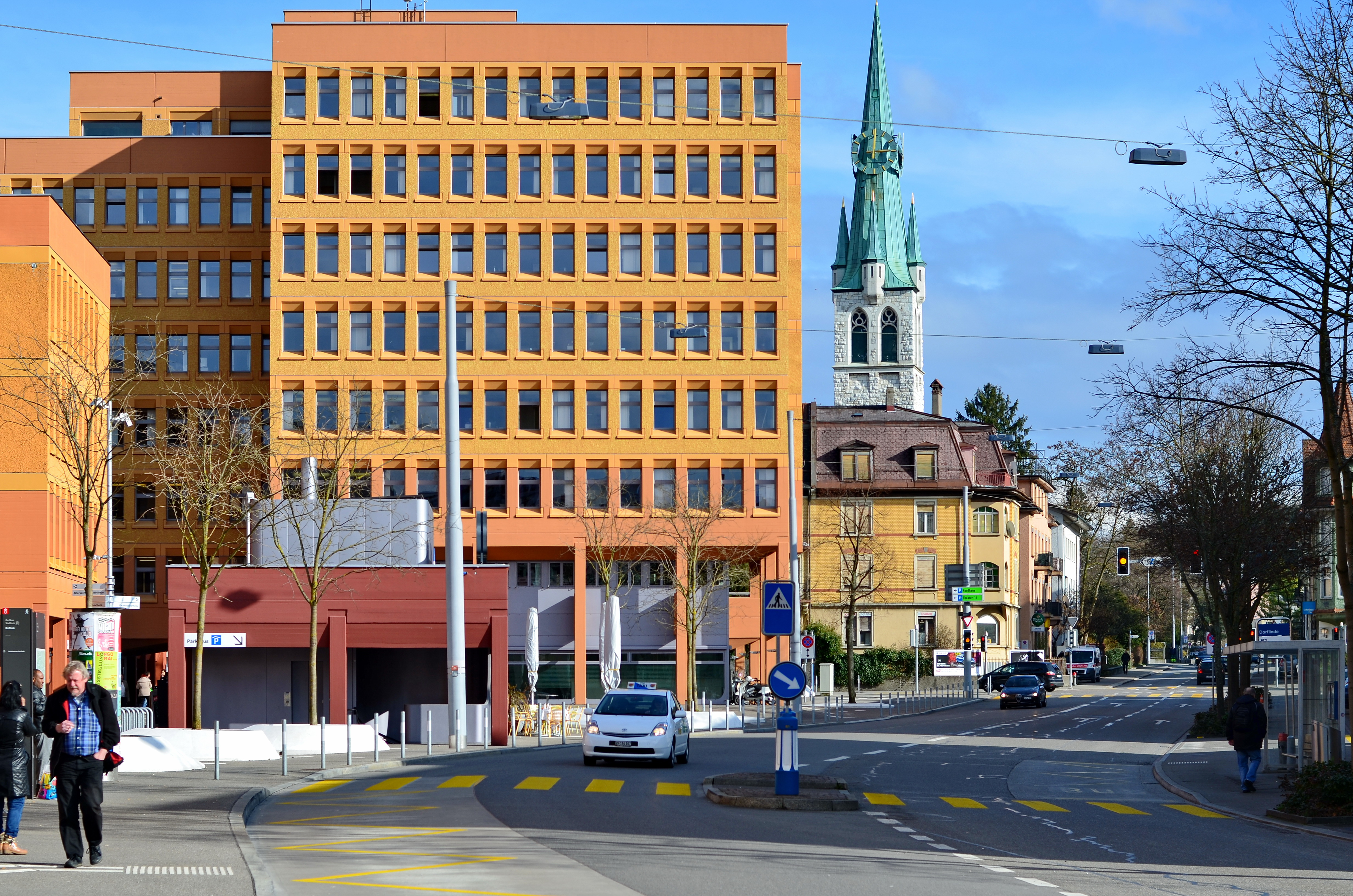 Überbauung Dorflinde in Zürich-Oerlikon (Switzerland)